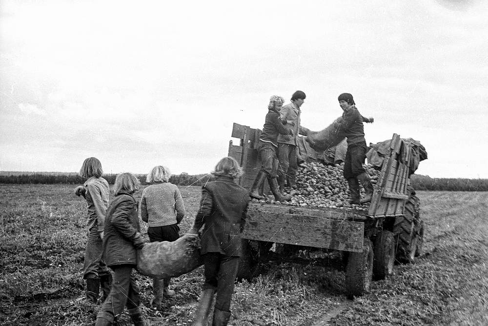 Ученики ГПТУ-6 грузят картофель для отправки в хранилище в колхозе «Правда». Свыше 50 процентов площадей, занятых картофелем, уже убраны в этом колхозе. Коллективы переславских фабрик и училищ помогают селянам добиться успехов на уборке «второго хлеба». Деревня Кичибухино, Переславский район. (Переславский музей-заповедник, отдел истории советского общества, конверт 1087. По газетному списку номер 3.)